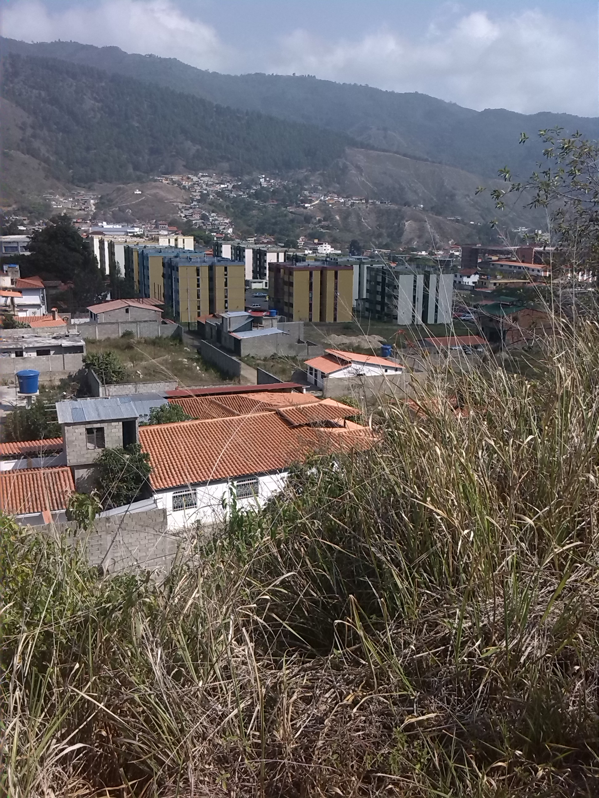 paisaje